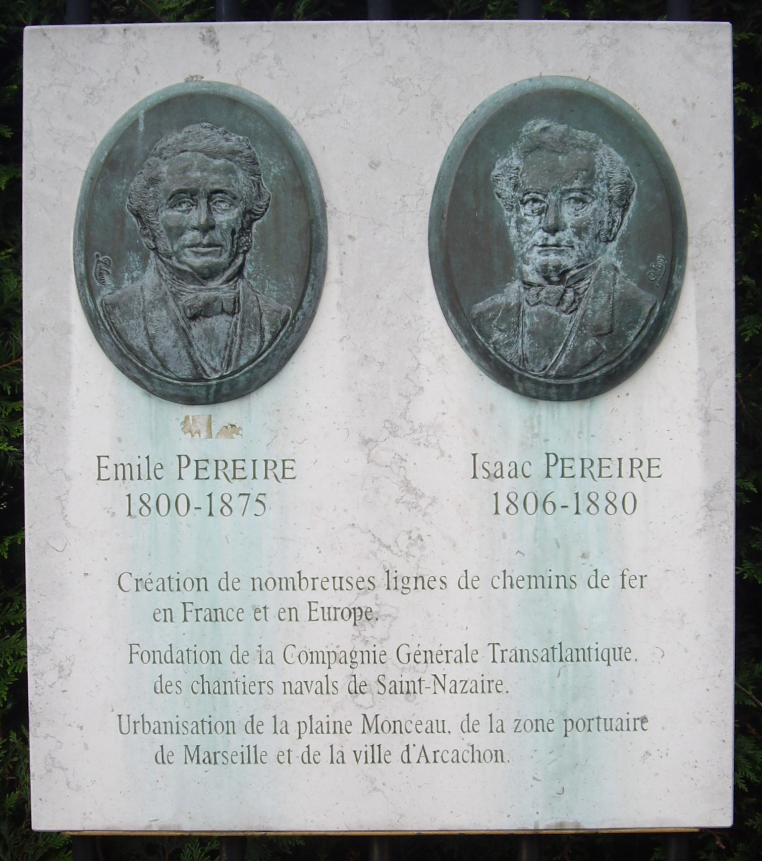 Plaque commémorative sur la place du Maréchal-Juin à l'entrée de la promenade Pereire, Paris 17e.« Émile Pereire, 1800-1875. Isaac Pereire, 1806-1880. Création de nombreuses lignes de chemin de fer en France et en Europe. Fondation de la Compagnie générale transatlantique, des chantiers navals de Saint-Nazaire. Urbanisation de la plaine Monceau, de la zone portuaire de Marseille et de la ville d'Arcachon. »